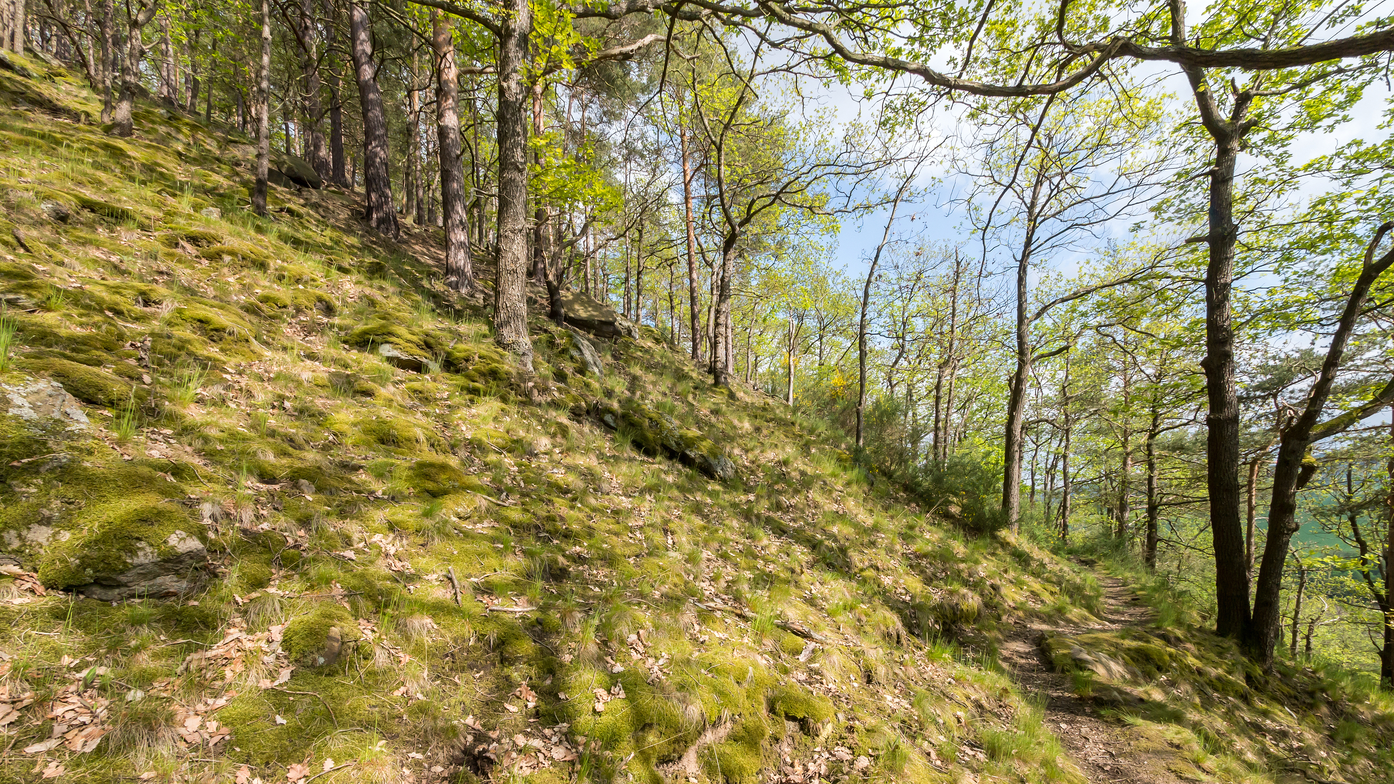 Hangmischwald – hier vorwiegend junge Eichen, Pionierrasen mit Moosen und Flechten – im Naturschutzgebiet „Schenkenberg“, Thüringen; I